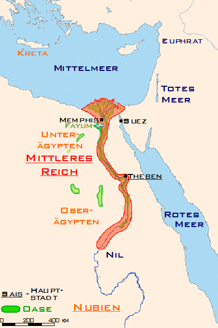 Ausdehnung des altes ägytischen Reiches (Mittleres Reich) Karte wurde selbst erstellt